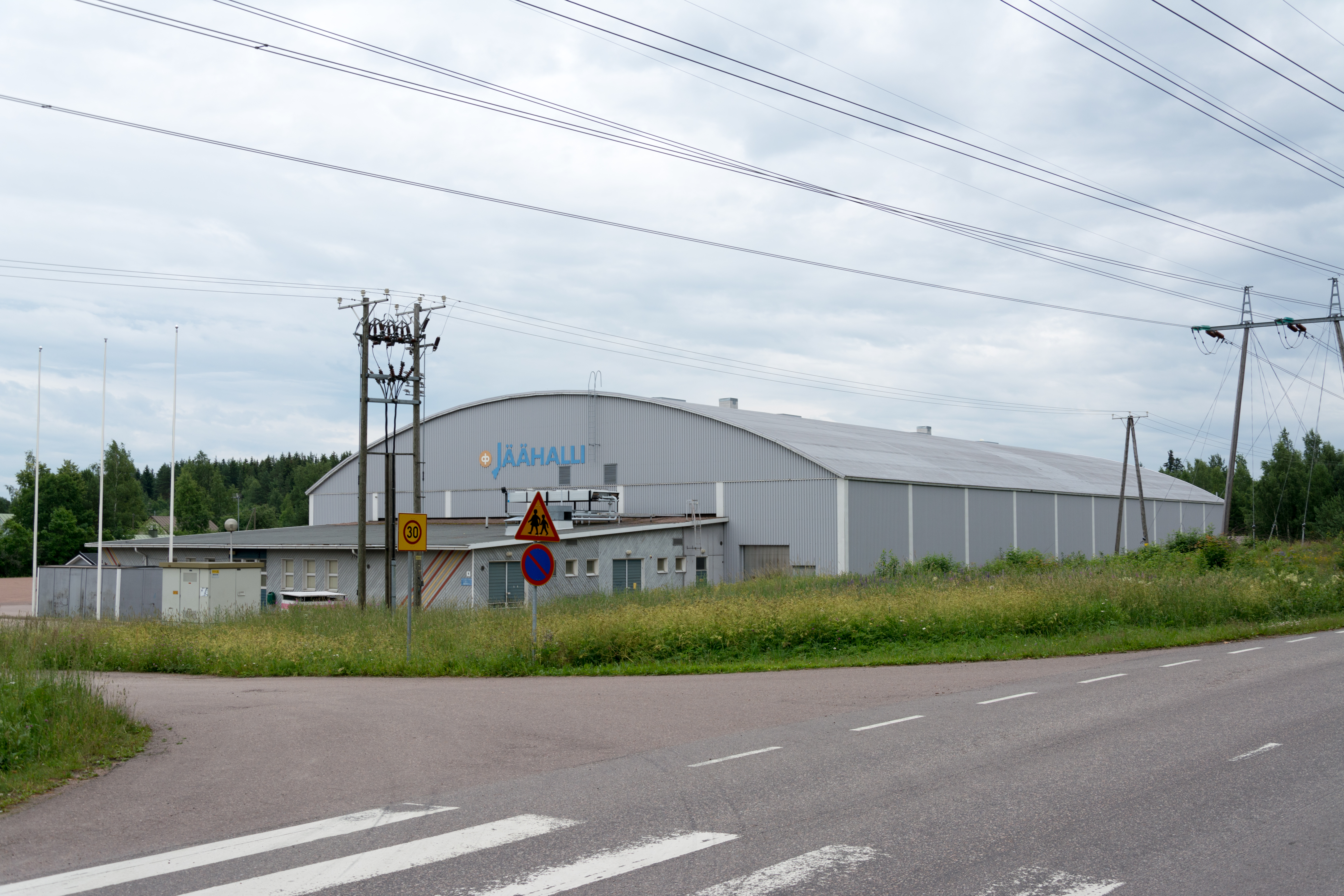 Inkeroisten jäähalli, Kouvola